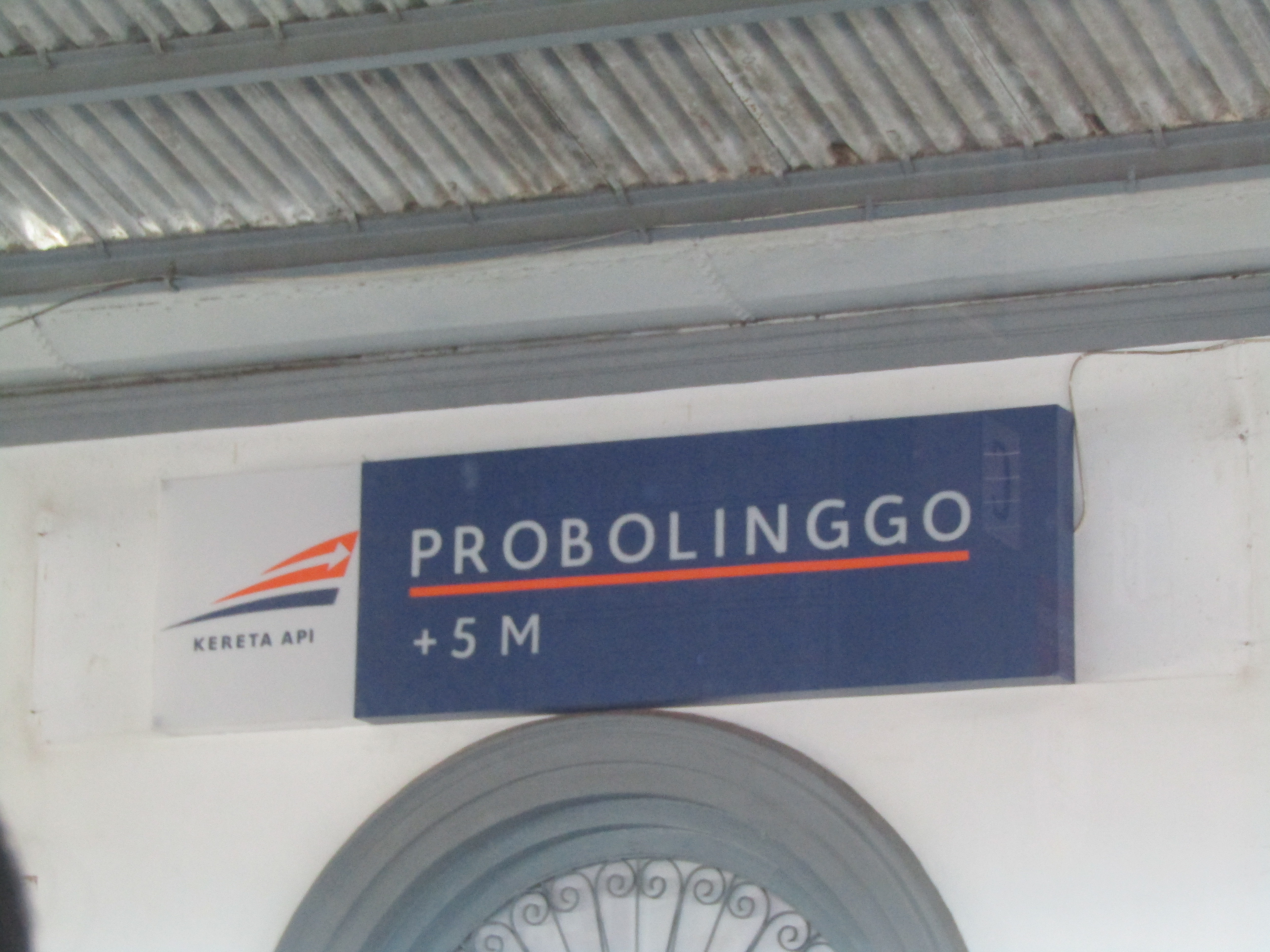 Papan baru stasiun, 2019